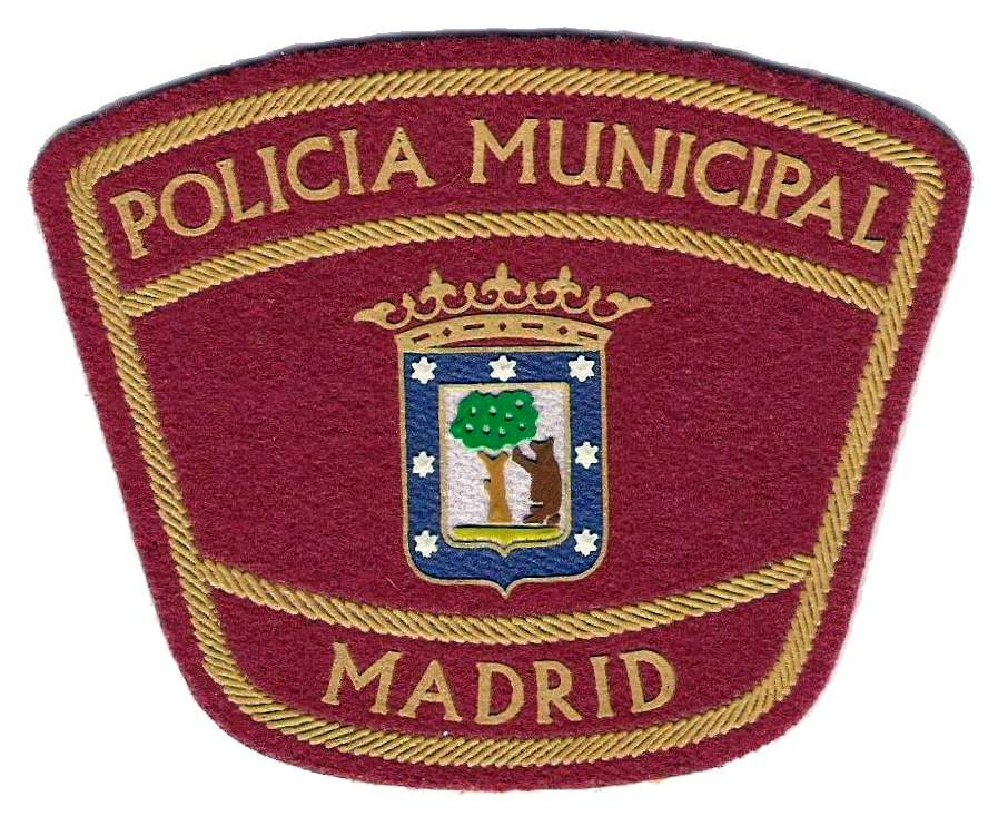 Parche de la Policía Municipal de Madrid